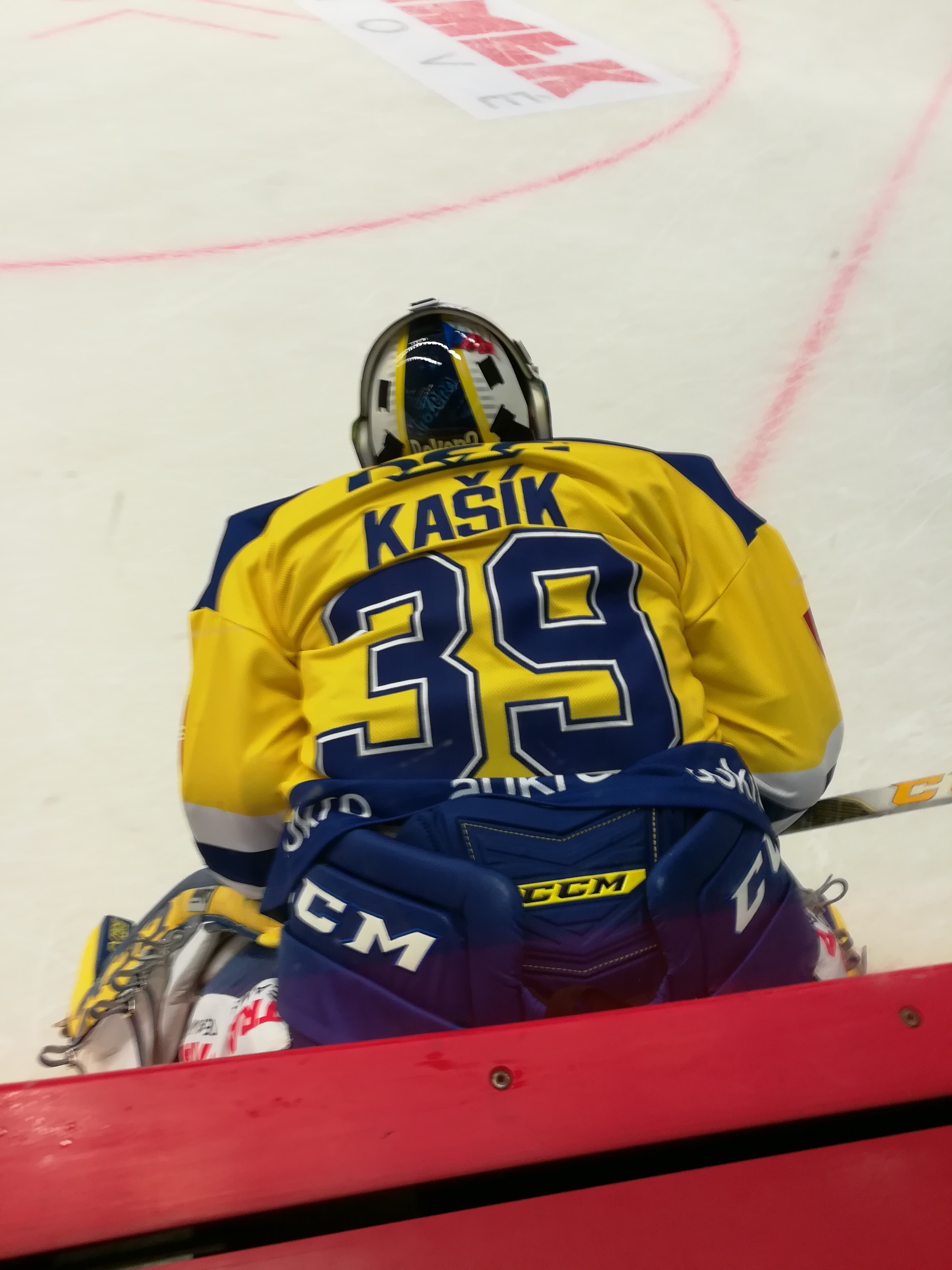 Libor Kašík, HC Dukla Jihlava - PSG Zlín, 2017/18. Tipsport extraliga 2017/18